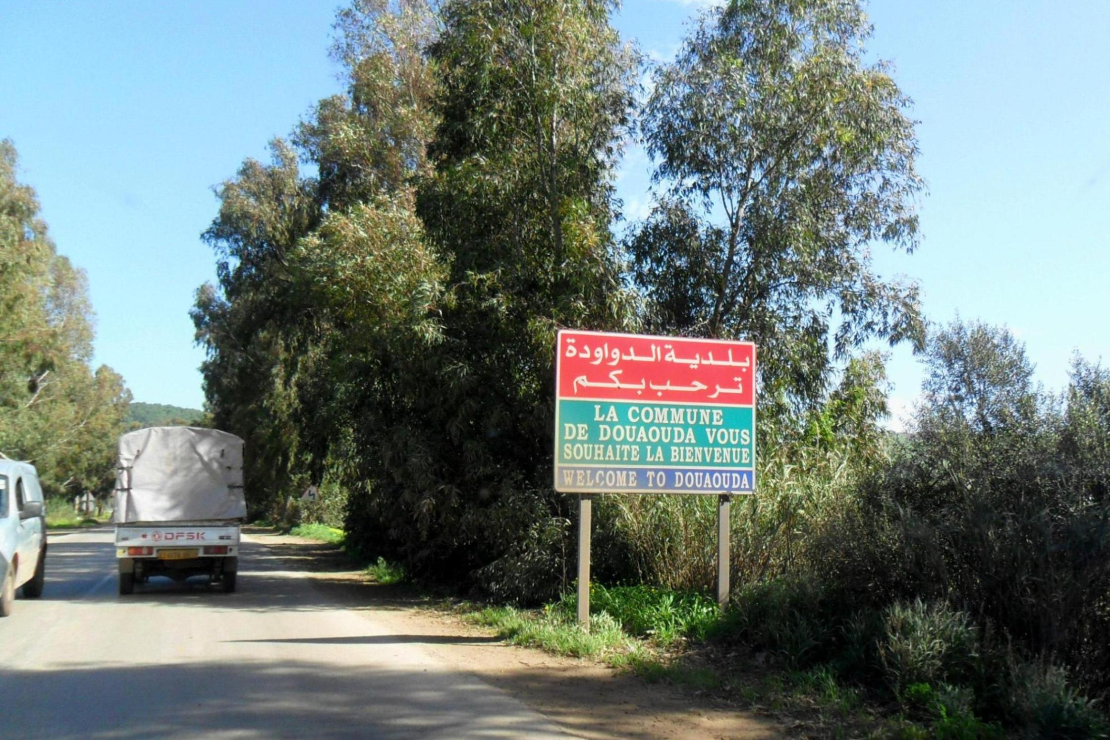 Douaouda الدواودة